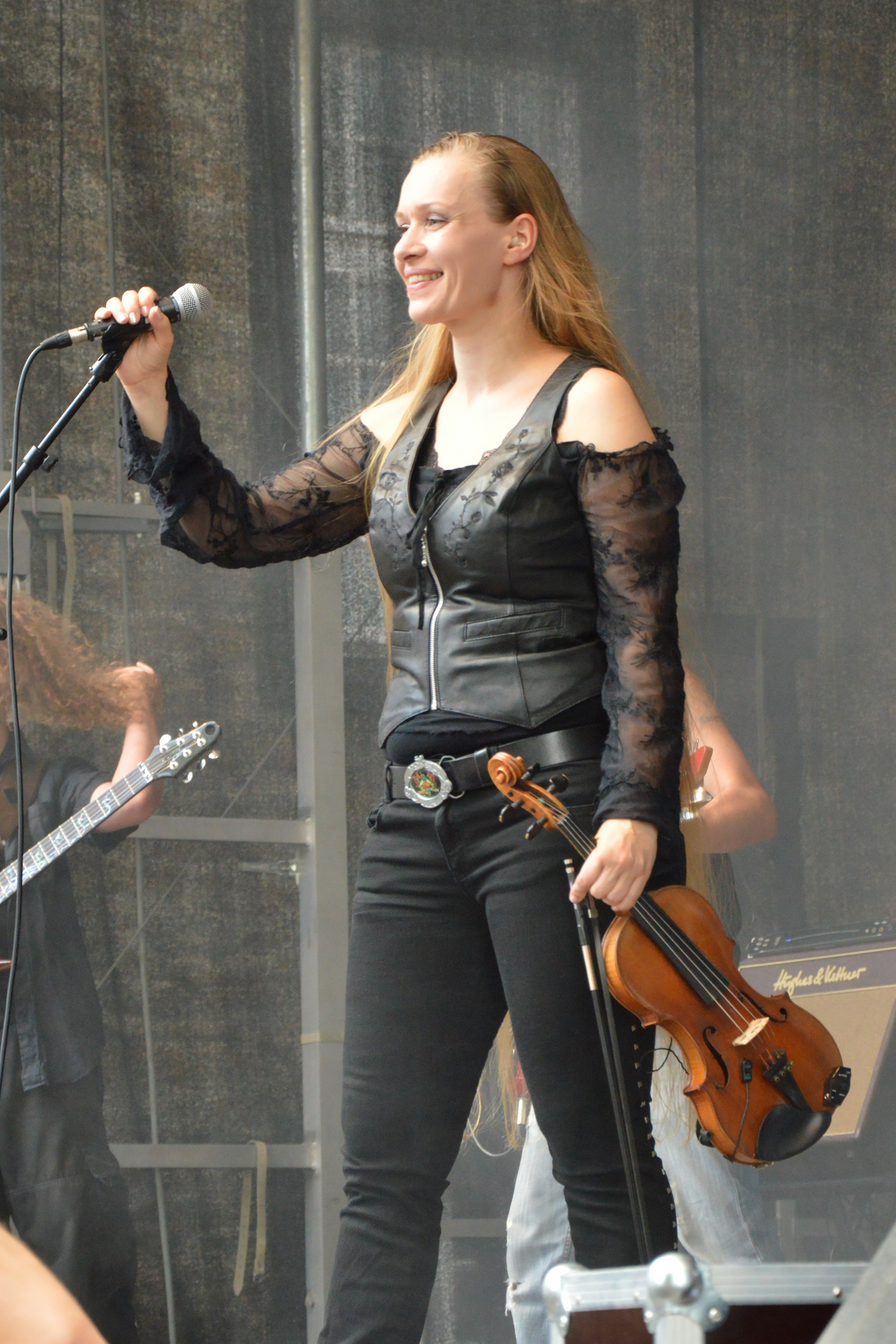 Ally Storch beim Burgfolk Festival 2013 in Schloß Broich